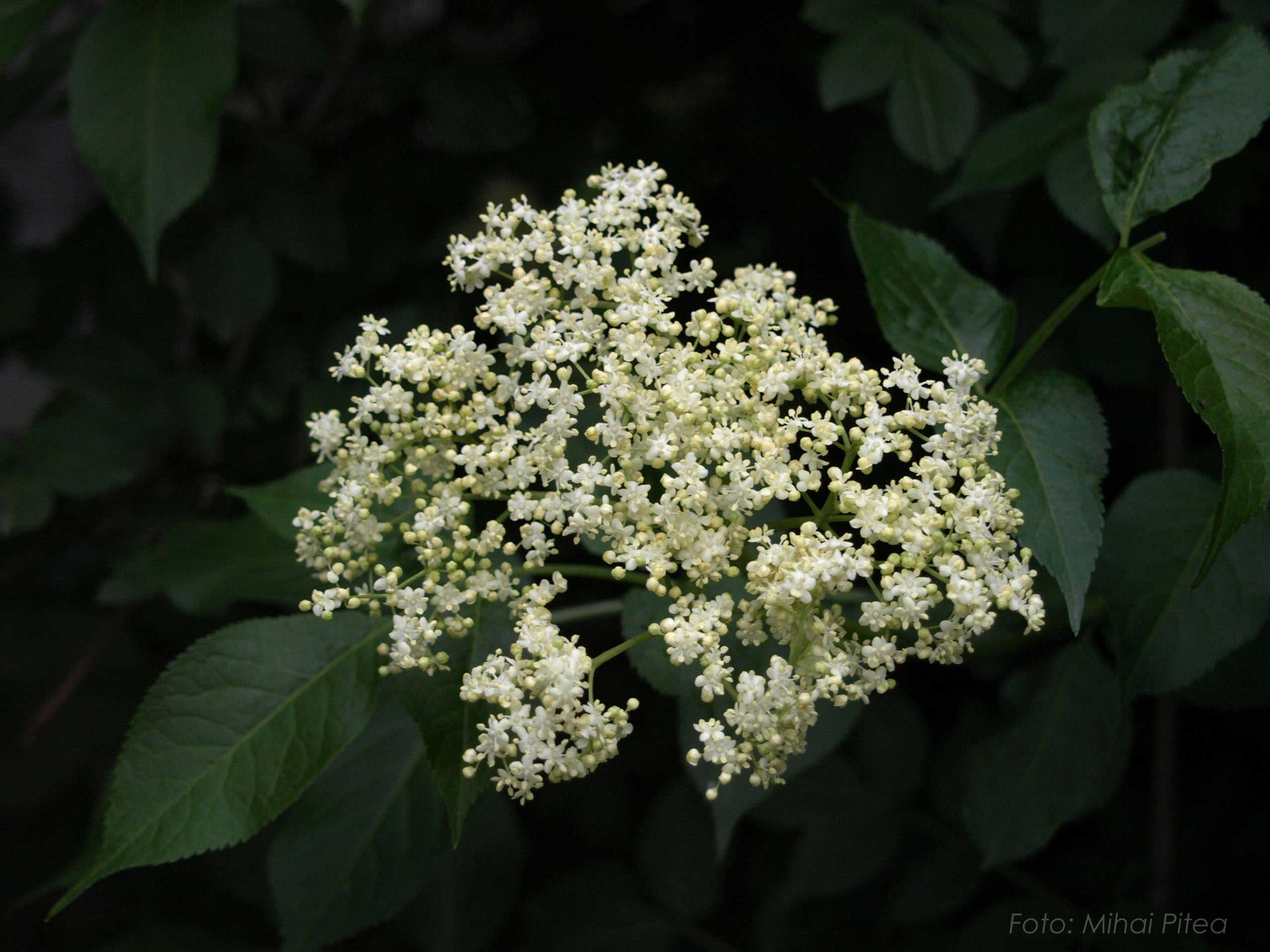 Inflorescență de soc, fotografiată la sfârșitul lunii mai (2013) în orașul Brașov.